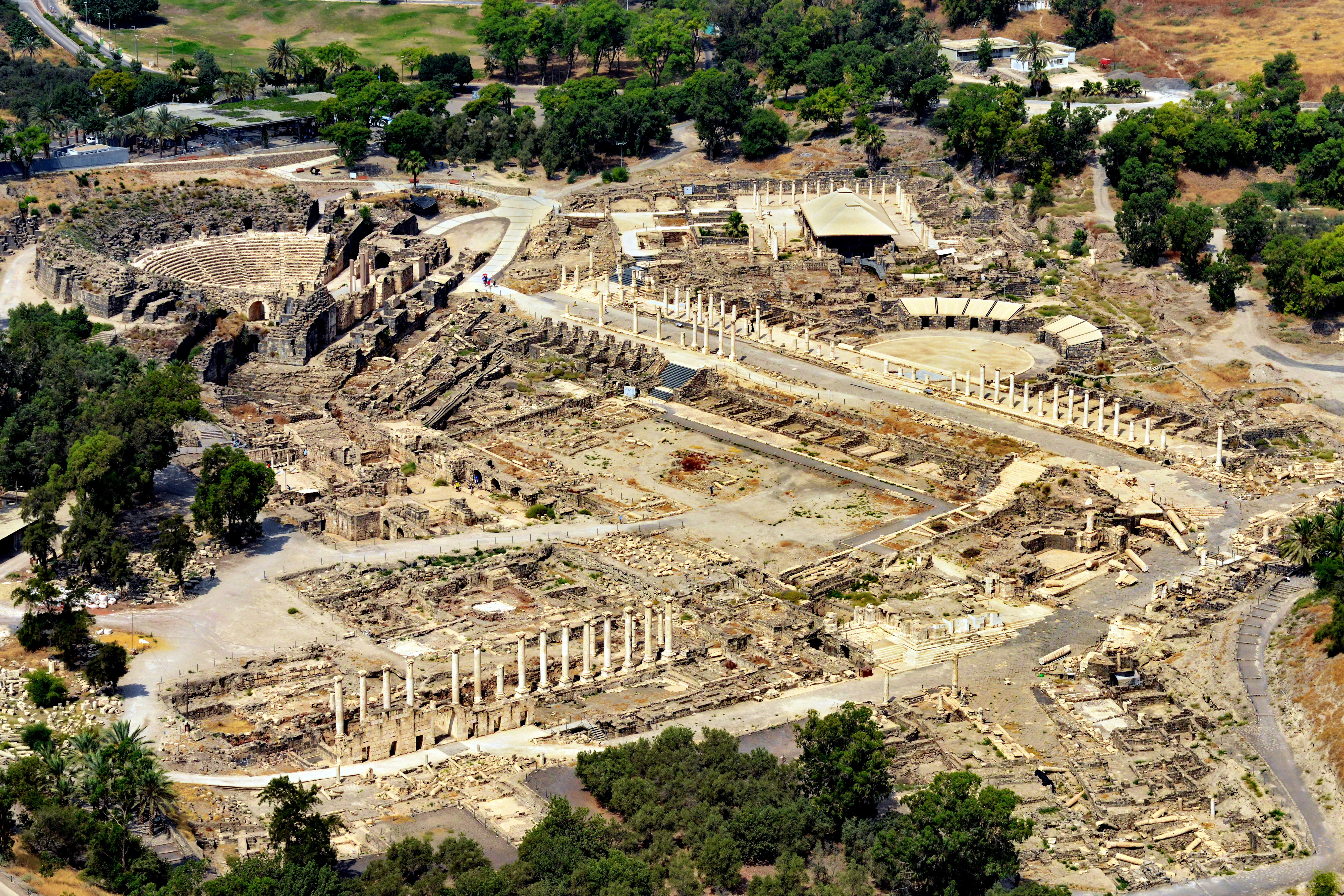 בית שאן מוזכרת במקורות והיא מיושבת ברציפות מאז התקופה הכלקוליתית (4000 לפנה"ס). היא ממוקמת על צירים של כמה דרכים אסטרטגיות:ירושלים-טבריה; בקעת הירדן-הים התיכון; דרך הים שחיברה בין מצריים למסופוטמיה, נמצאת על נקודת המפגש בין בקעת הירדן לעמק יזרעאל.